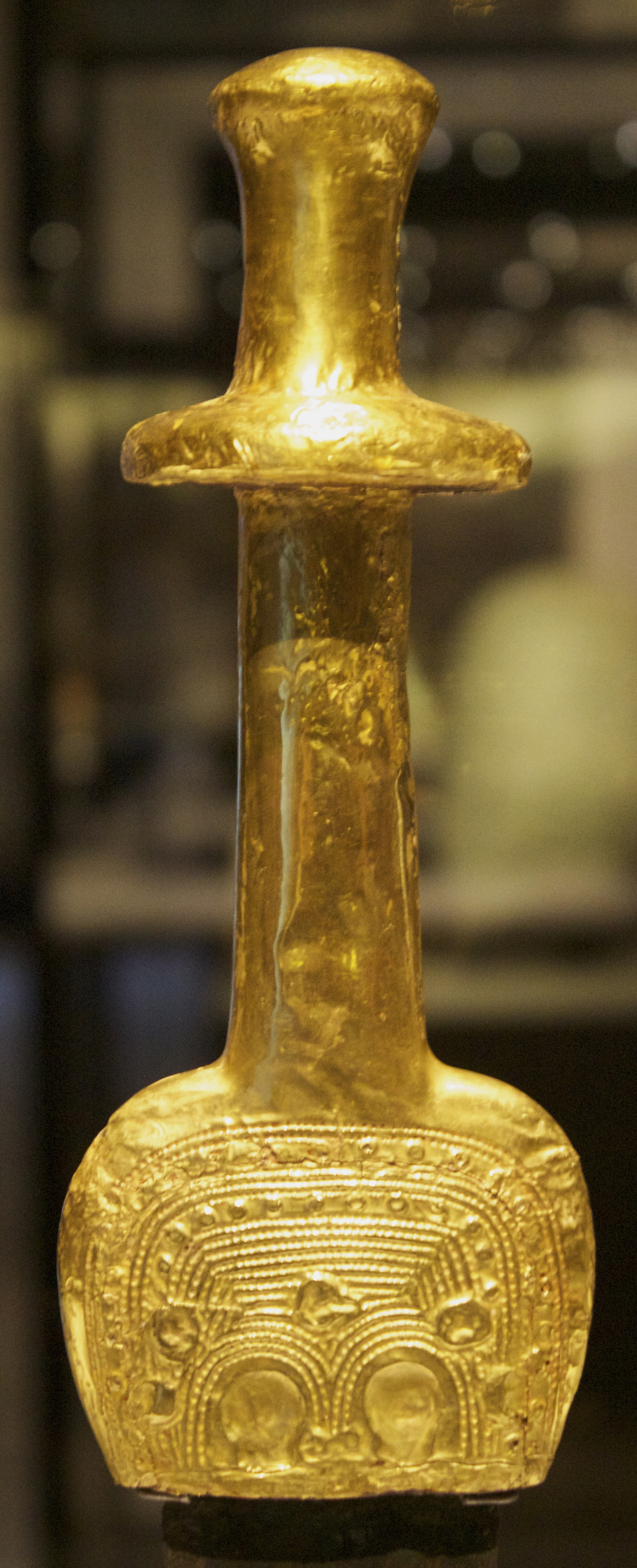 Madrid, M.A.N. Espada de Guadalajara.